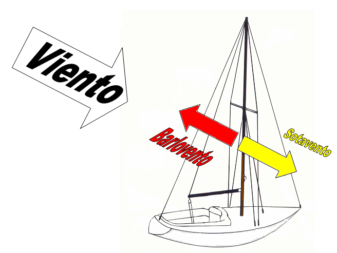 dirección de barlovento y sotavento